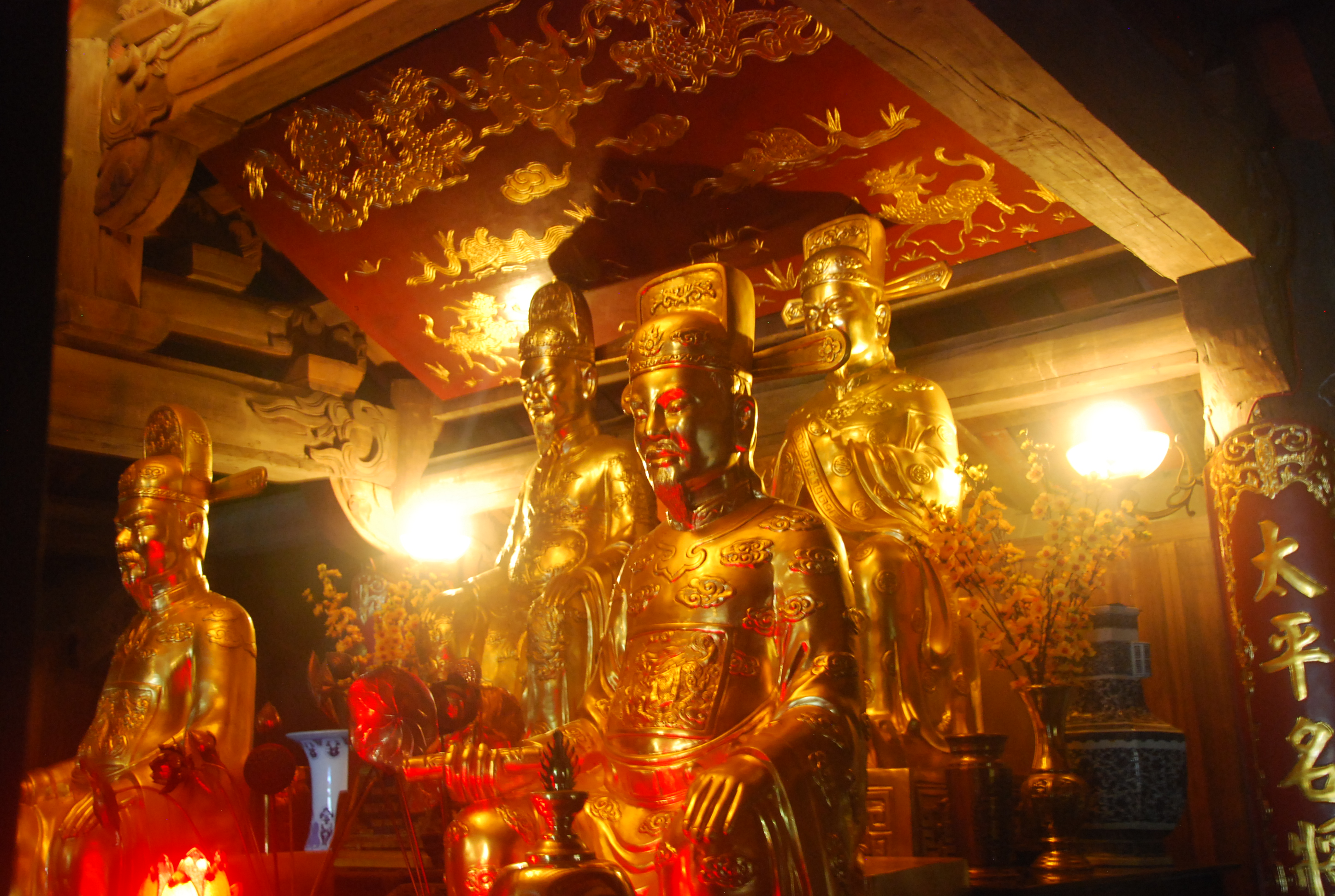 Tượng Tứ trụ triều Đinh trong đền Tứ Trụ - Phong cảnh khu du lịch sinh thái Tràng An ở Ninh Bình